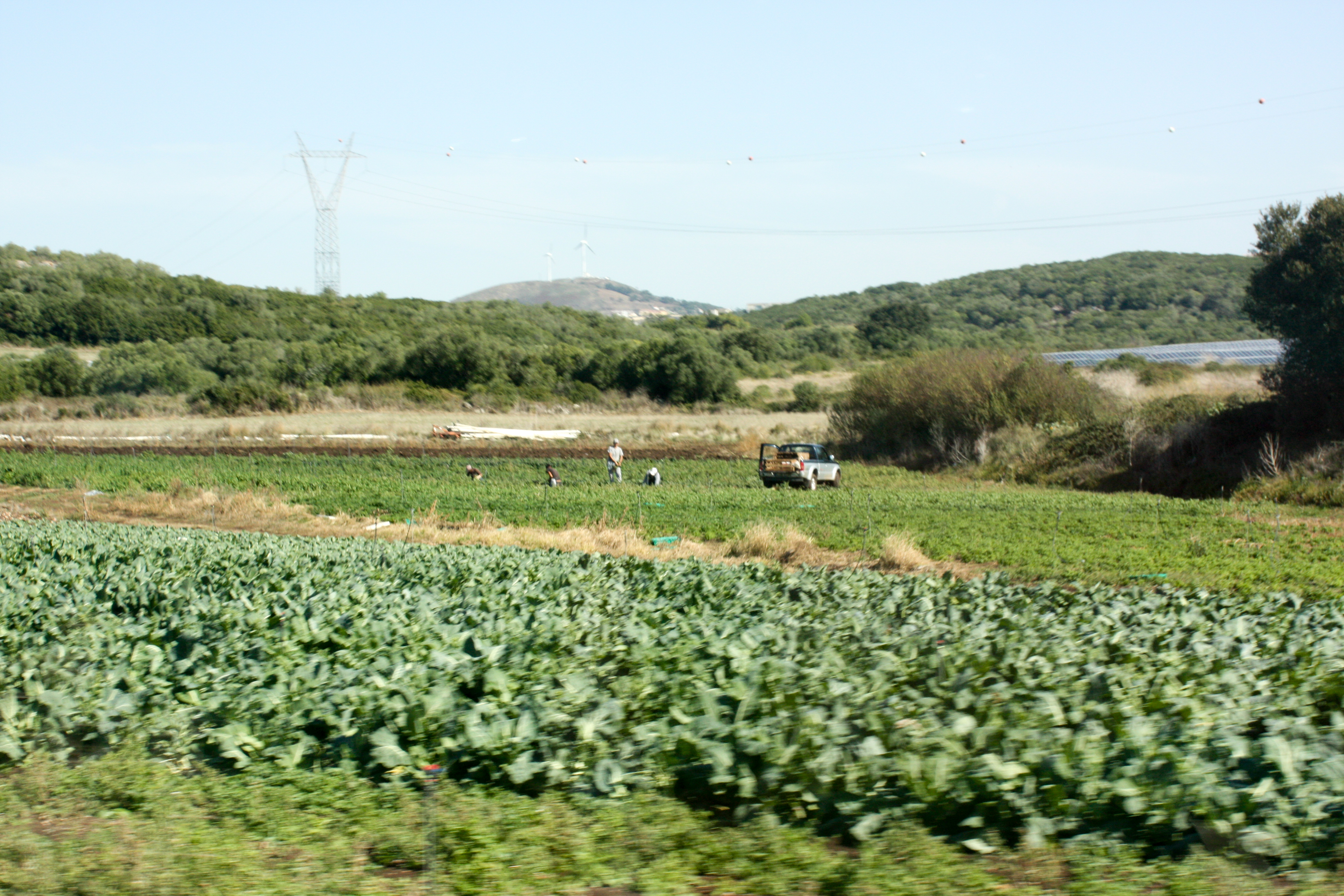 Agricultores em Alfouvar